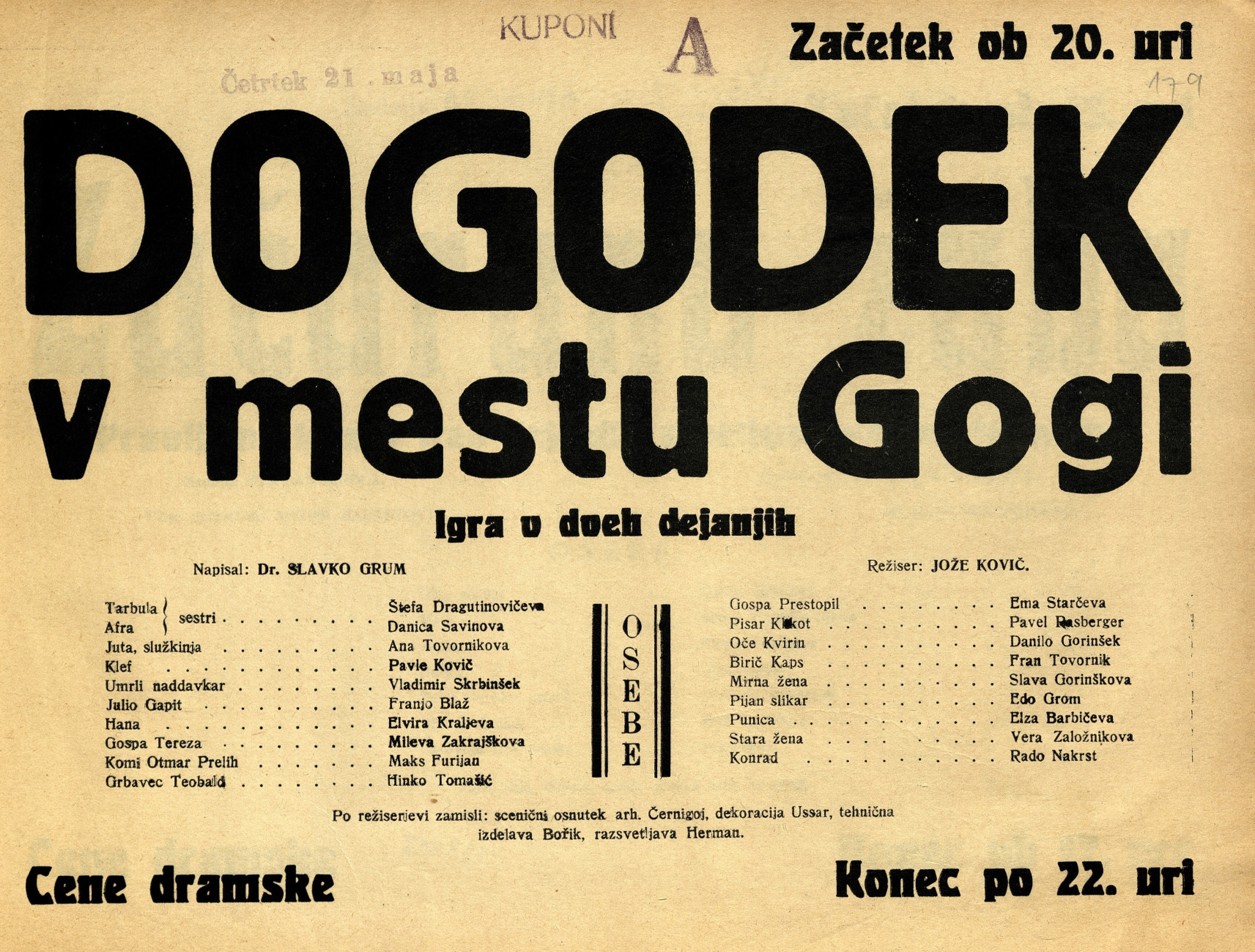 Plakat za predstavo Dogodek v mestu Gogi v Narodnem gledališču v Mariboru.